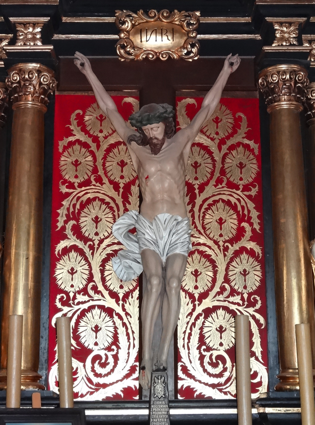 Katedra w Bydgoszczy. Barokowy ołtarz w kaplicy św. Krzyża. Drewniany, polichromowany (poł. XVII w., przekształcony w XIX w. i ok. 1920 r.) z rzeźbami: w polu środkowym renesansowy krucyfiks (1525 r.) na nowym tle, po bokach św. Grzegorz i św. Weronika; w nasadzie ołtarza płaskorzeźba Zmartwychwstanie. Mensa w kształcie sarkofagu z płaskorzeźbioną dekoracją akantowo-wstęgową (ok. 1730 r.), z tabernakulum (z tegoż okresu).